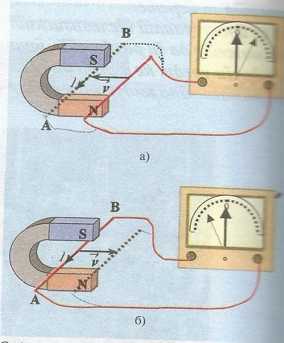 експеримент 1